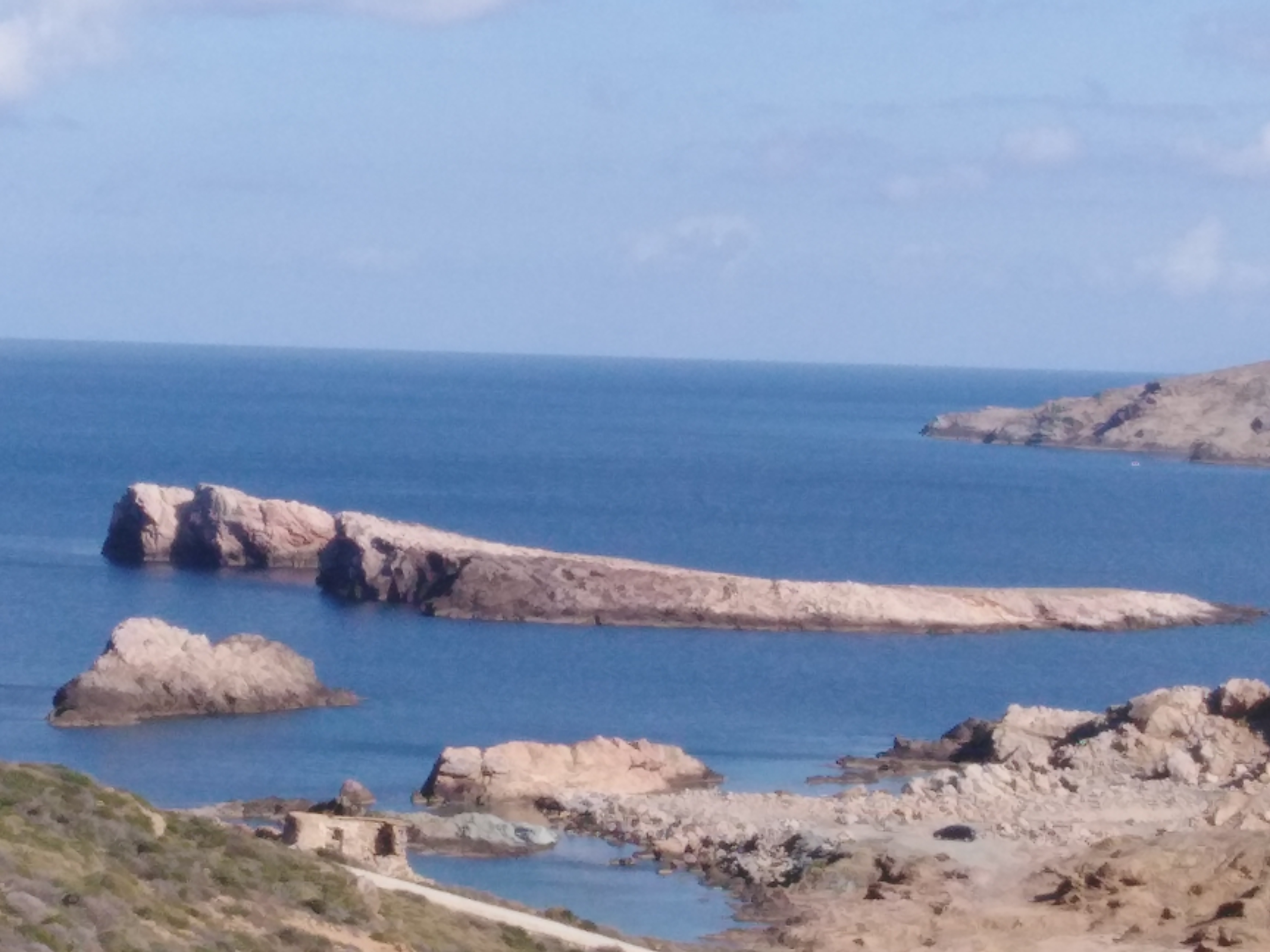 Η Νησίδα Μαρμαρονήσι στην Μύκονο